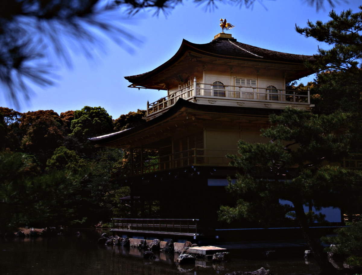 Zelfgemaakte media (gescande 6x7 dia)